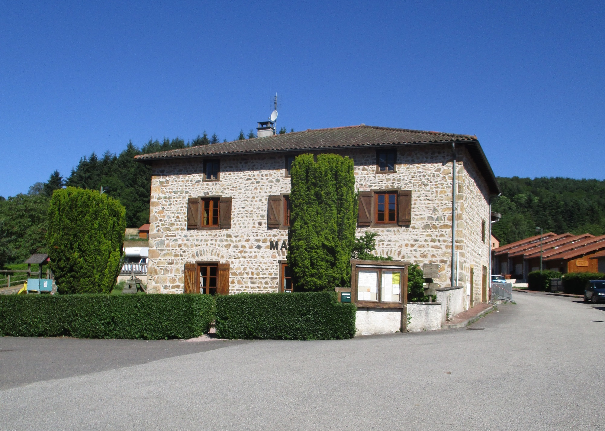 Mairie de CHERIER, Bourg des Moulins